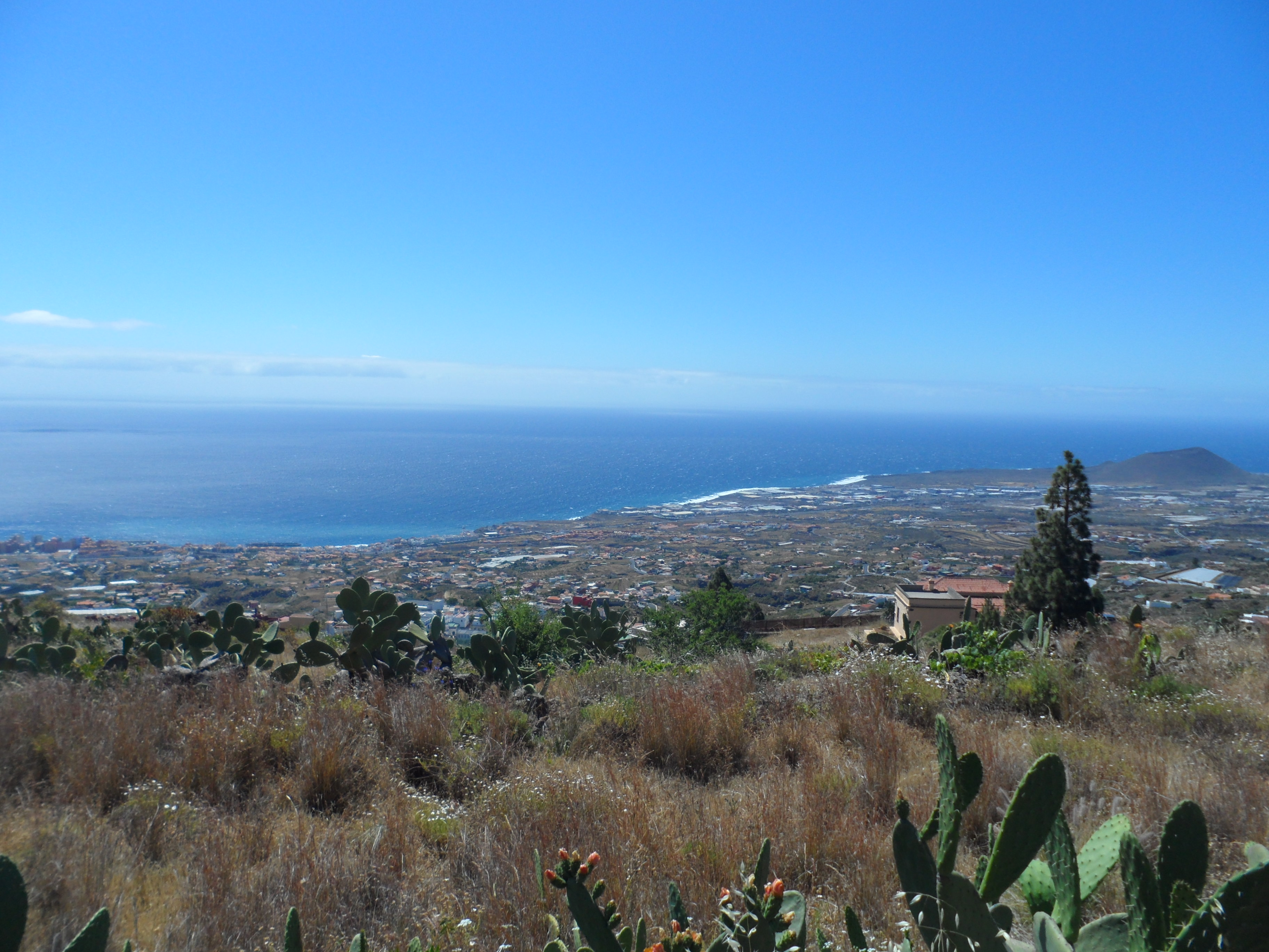 Vista de Araya de la carretera los Brezos.